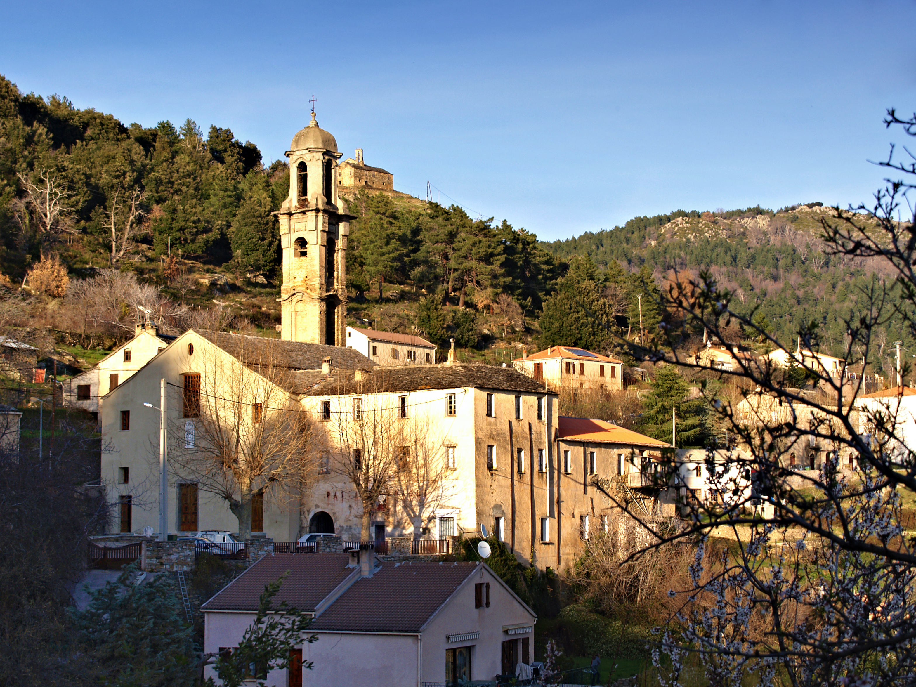 Morosaglia - Convento